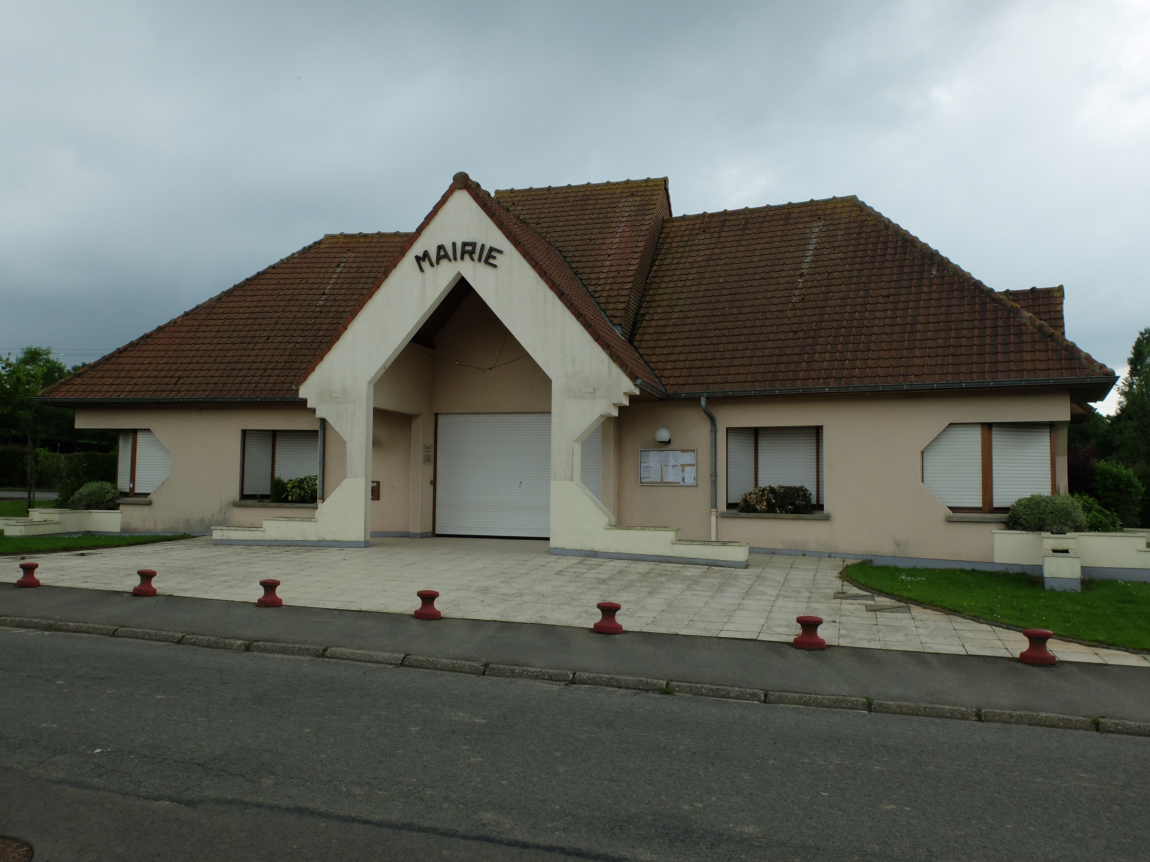 Vue de la mairie de Conteville-lès-Boulogne.